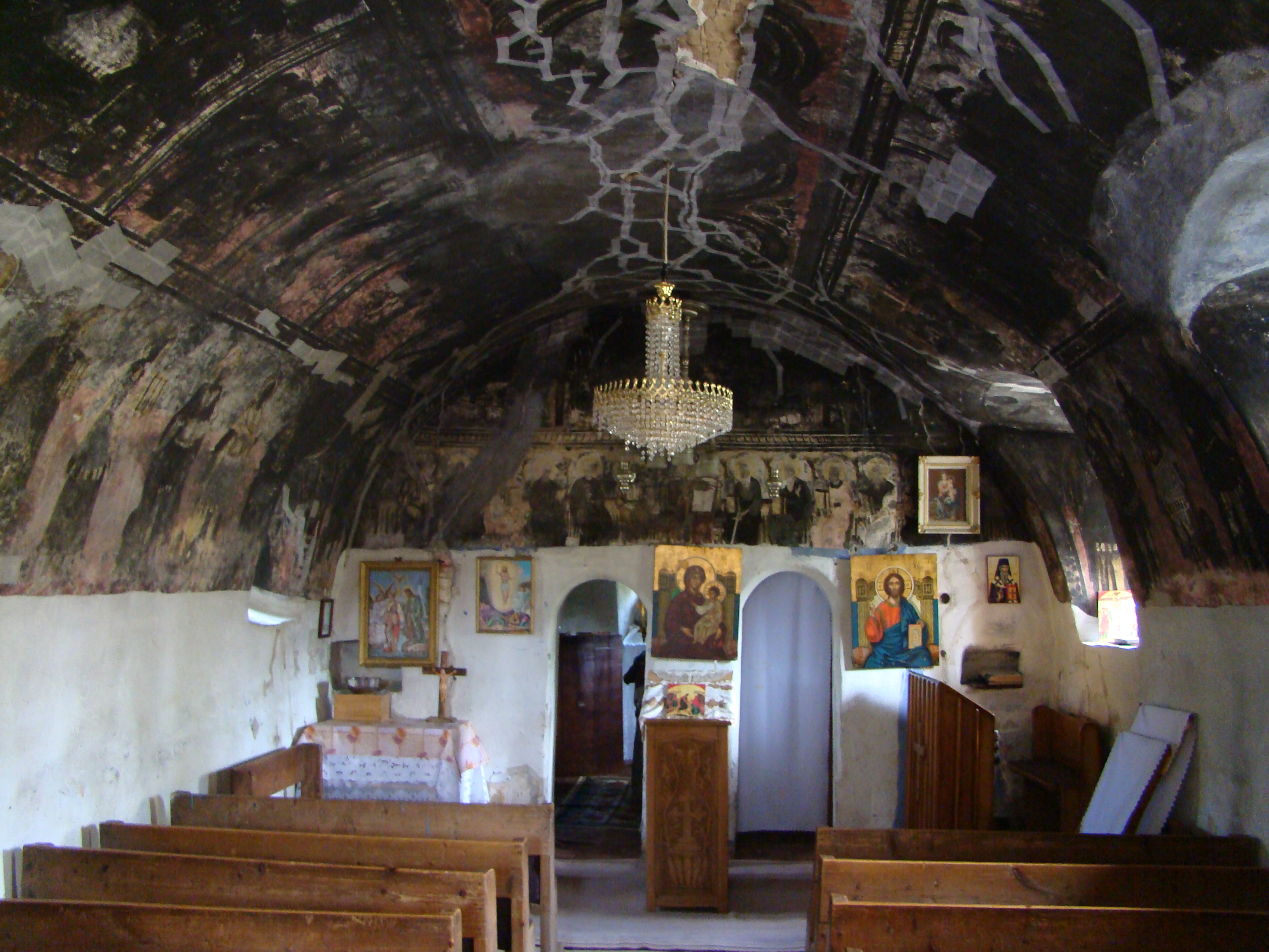 Cicău, Alba